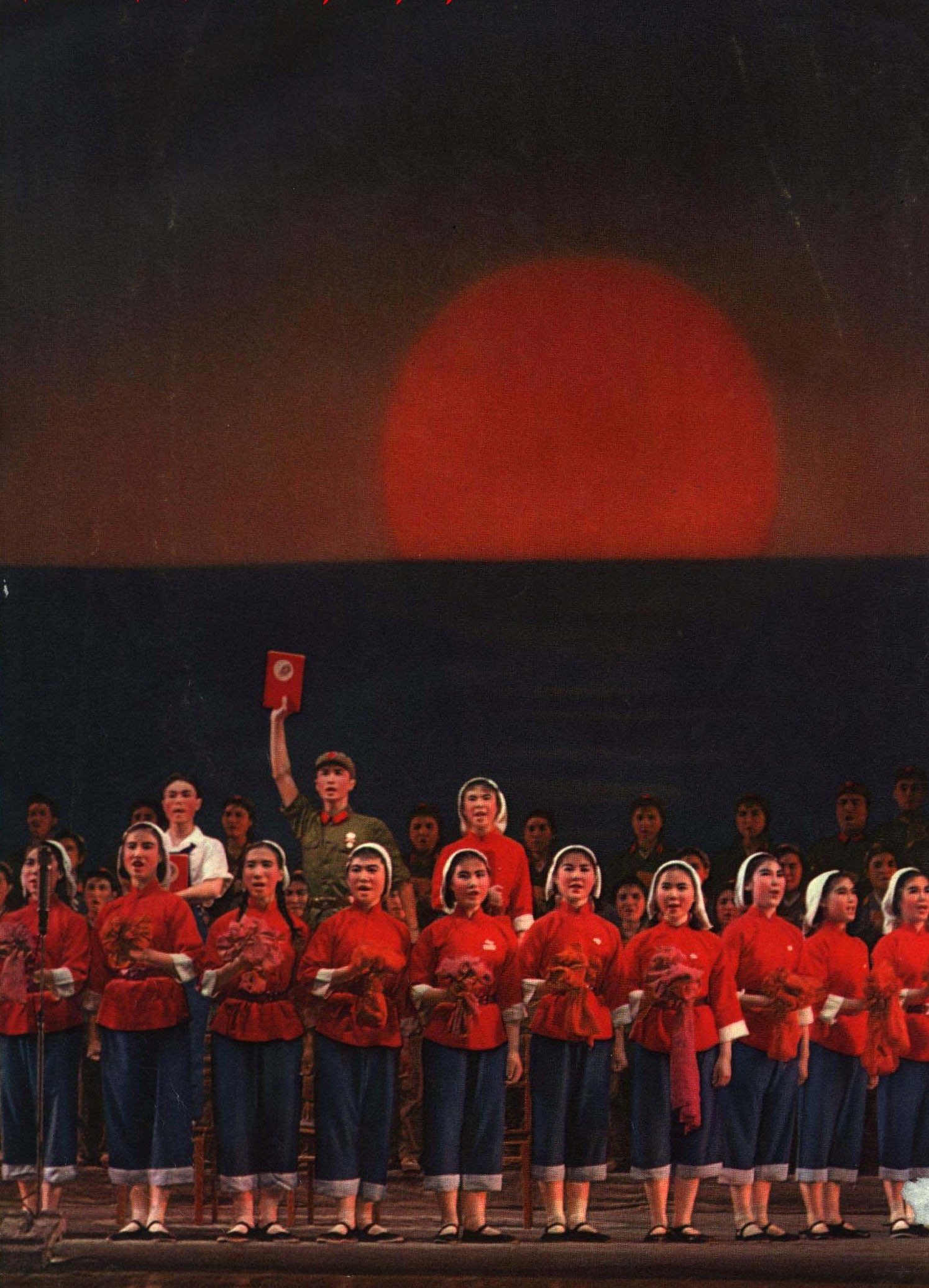 1967-08 1967年 东方红合唱